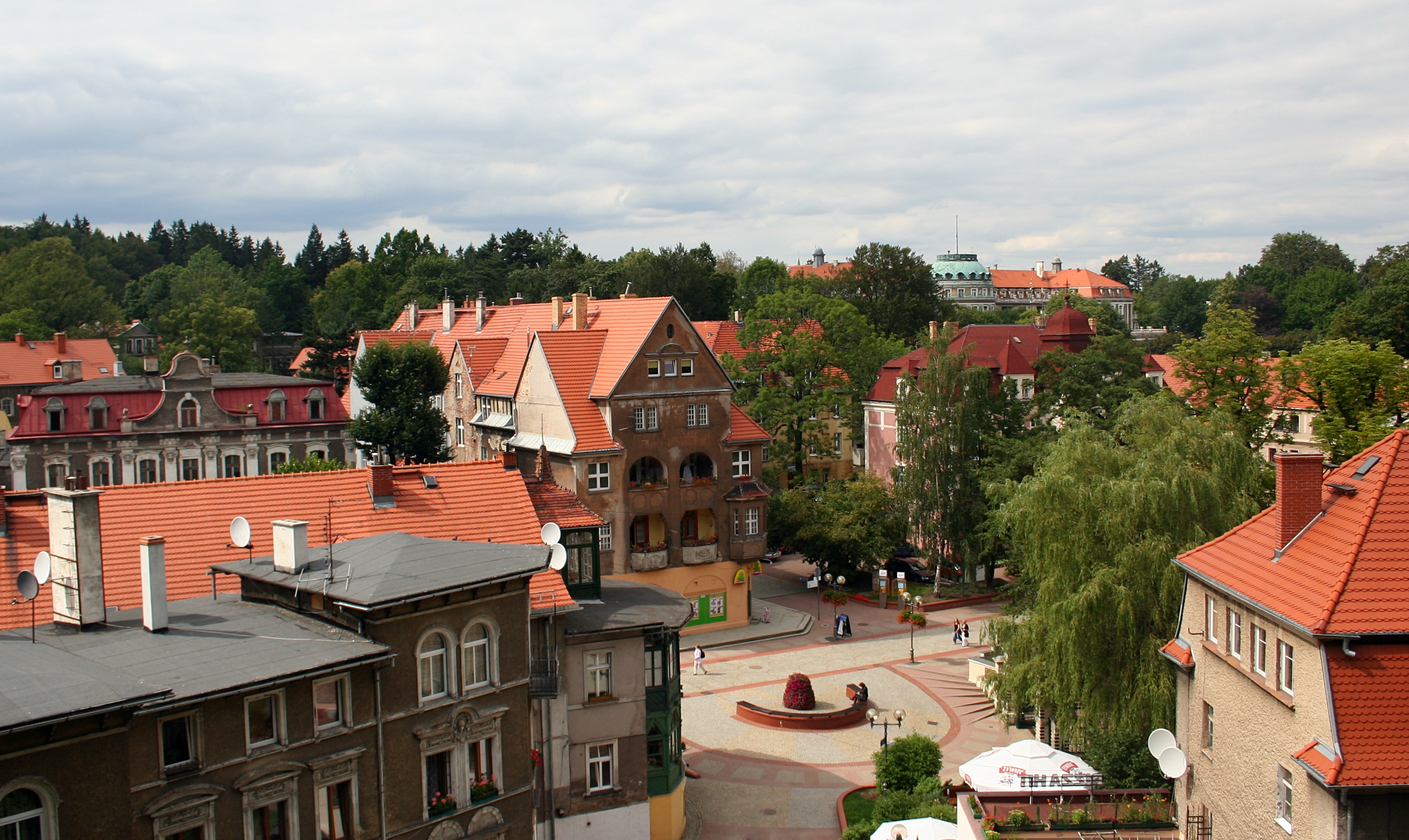 Widok z wieży widokowej w Szczawnie-Zdroju